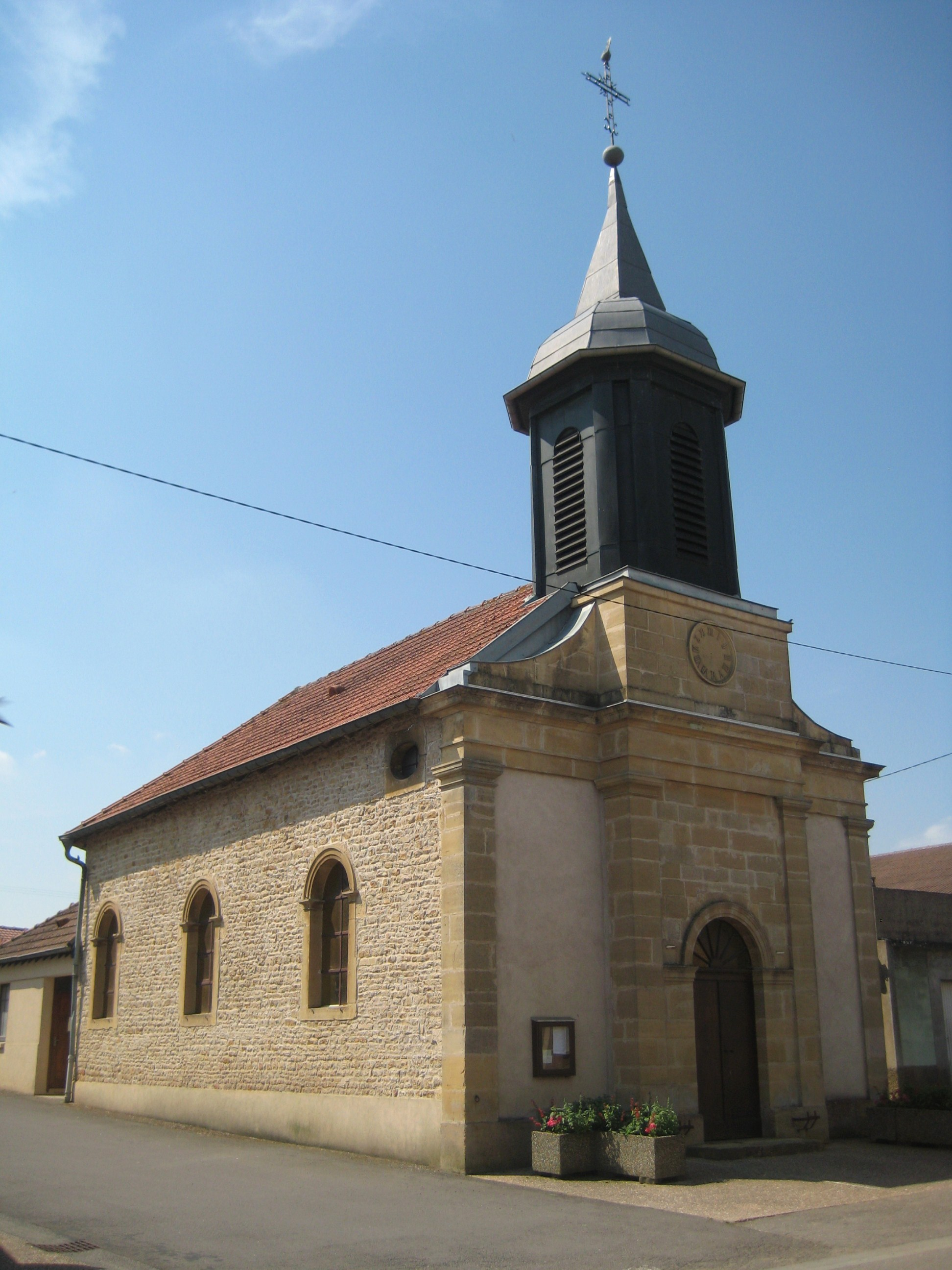 Description Église Saint-Hubert de LantéfontaineDate 26 June 2009Source mon appareil photoAuthor Aimelaime Église Saint-Hubert de Lantéfontaine